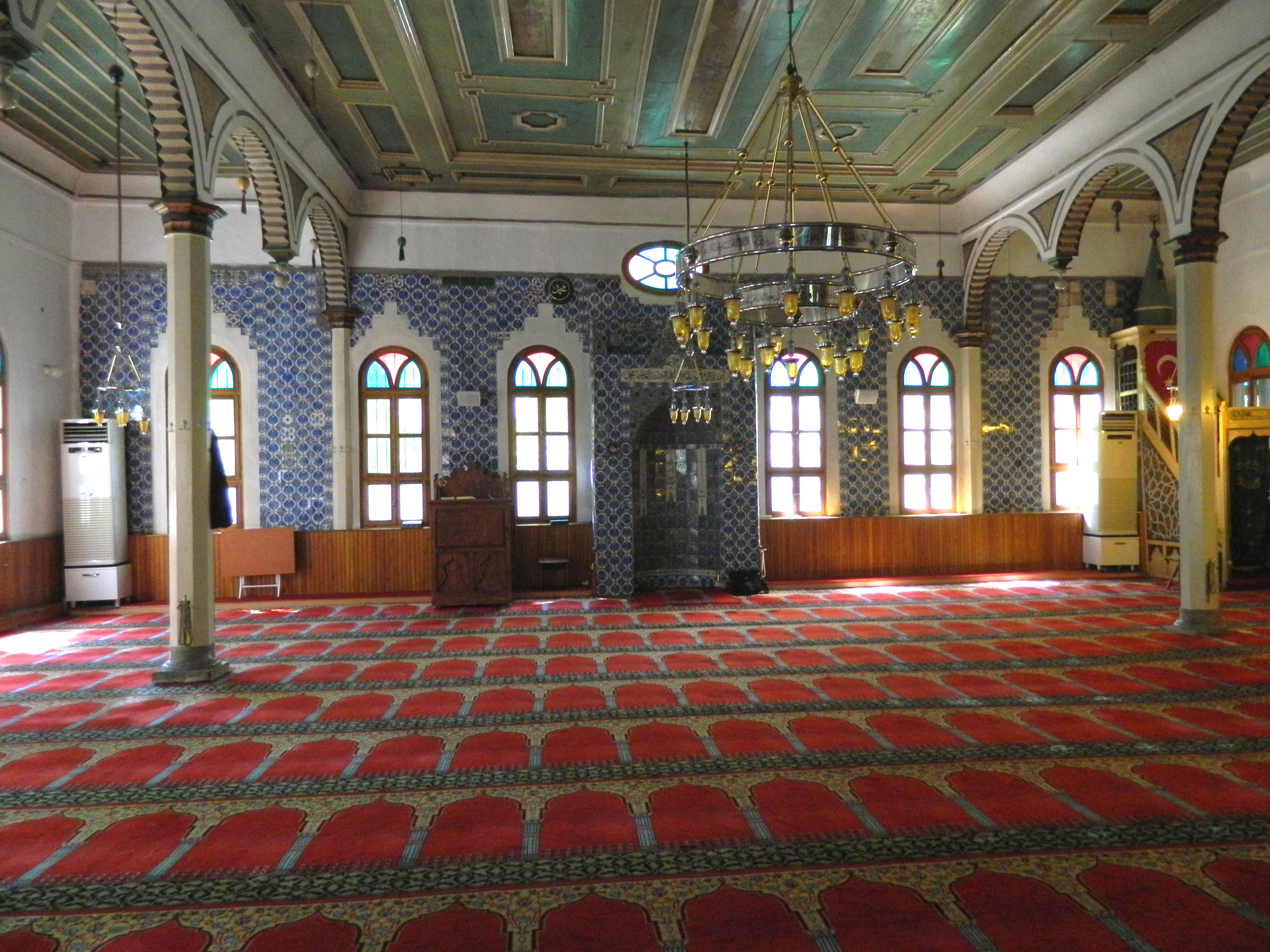 kütahya alo paşa camii içi